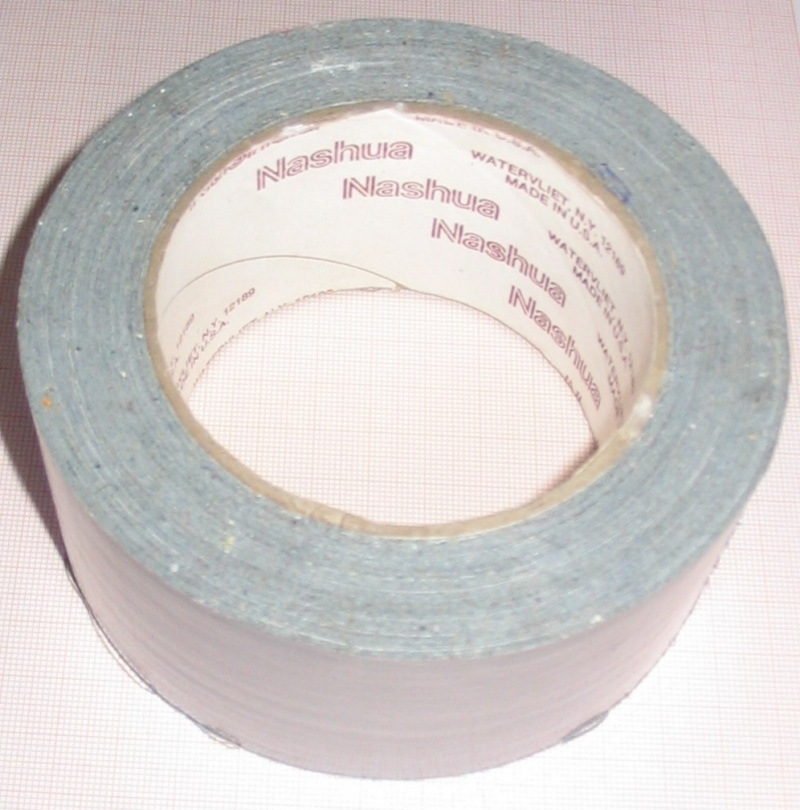 Gaffer tape.